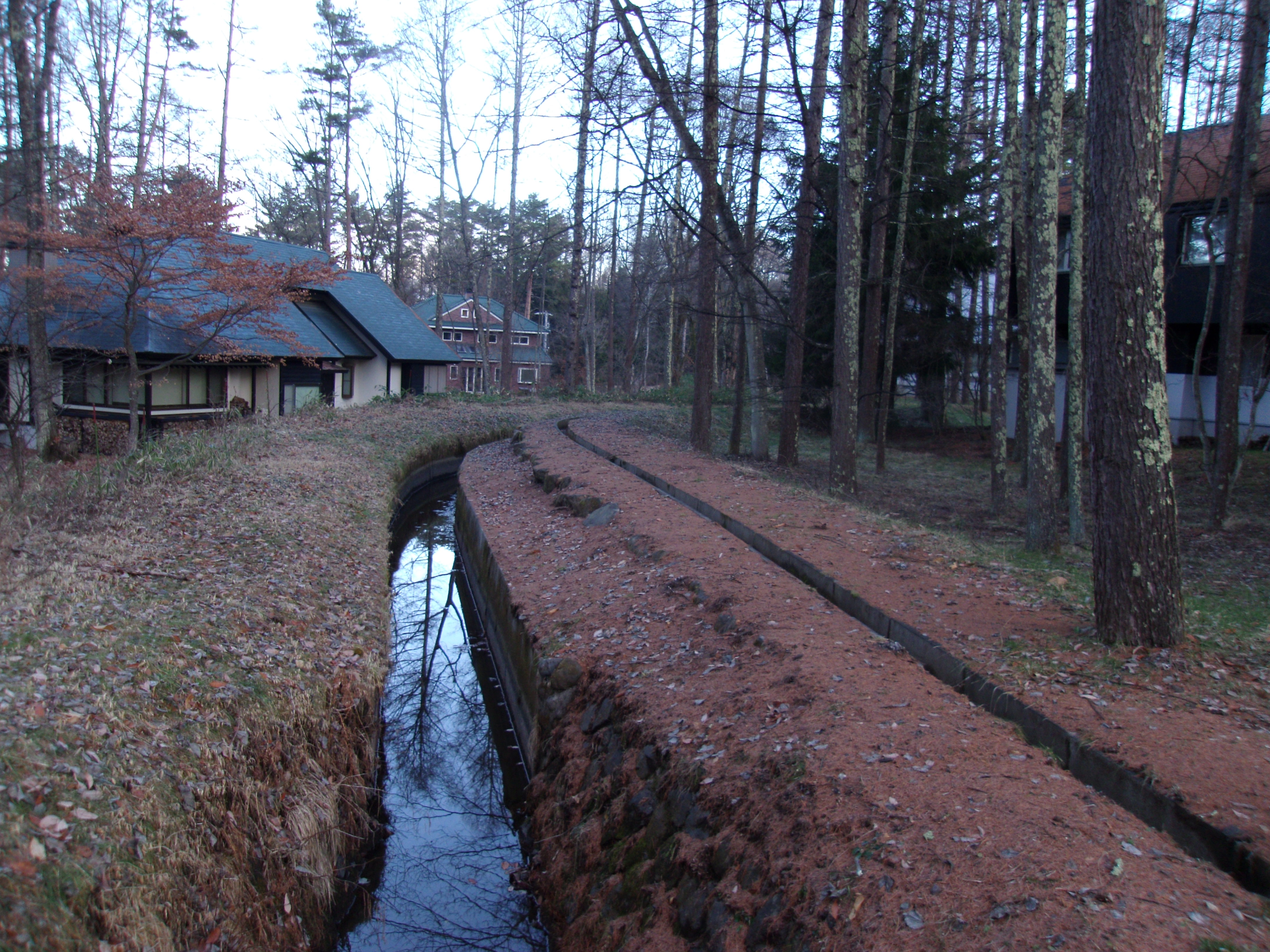 別荘地内を流れるかんがい施設遺産の大河原堰用水